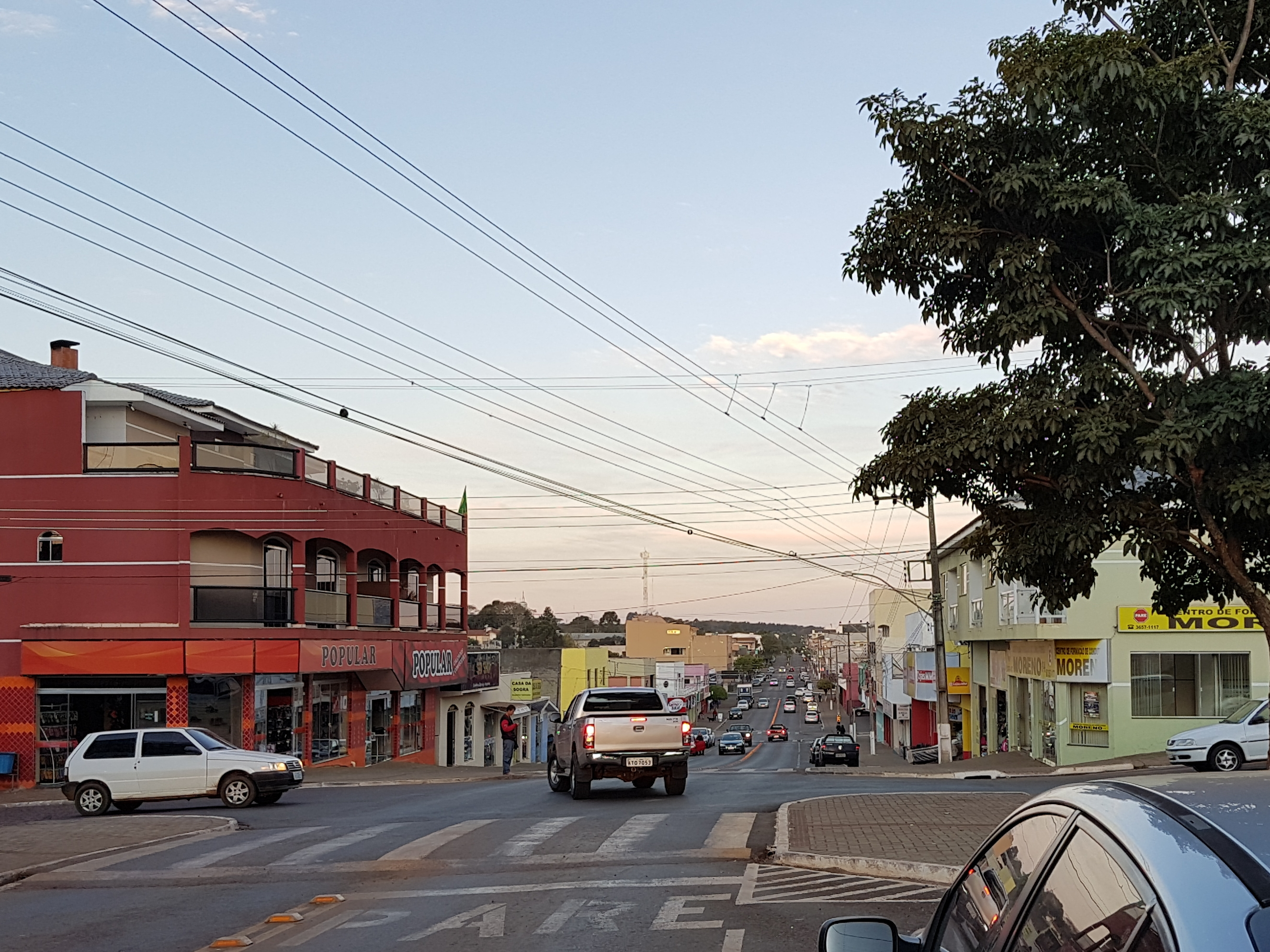 Avenida Maximiliano Vicentin, centro de Palmital-PR.